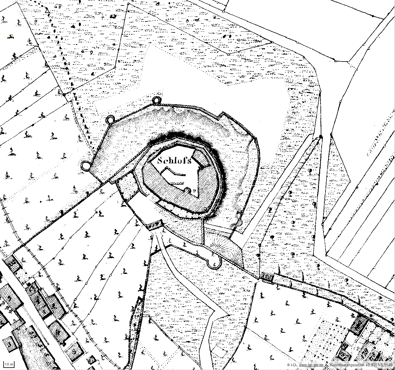 Schloss Kaltenstein über Vaihingen an der Enz (auf der Urflurkarte von 1832)